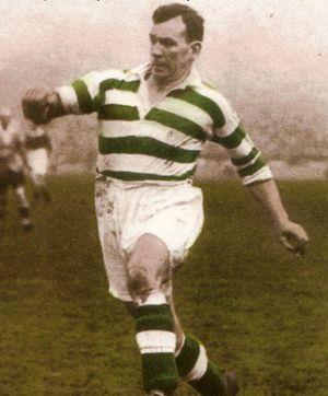 Шотландськиц футболіст Джиммі Макгрорі